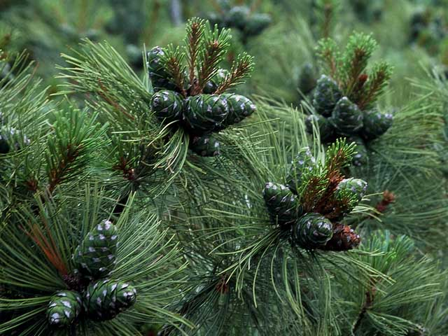 Hoja y piña de Pinus pumila en Cerro de Azufre en Kawayu-onsen de Hokkaido, Julio 2005. Foto por usario simismo. ハイマツの葉と球果。2005年7月、北海道川湯温泉硫黄山にて投稿者が撮影